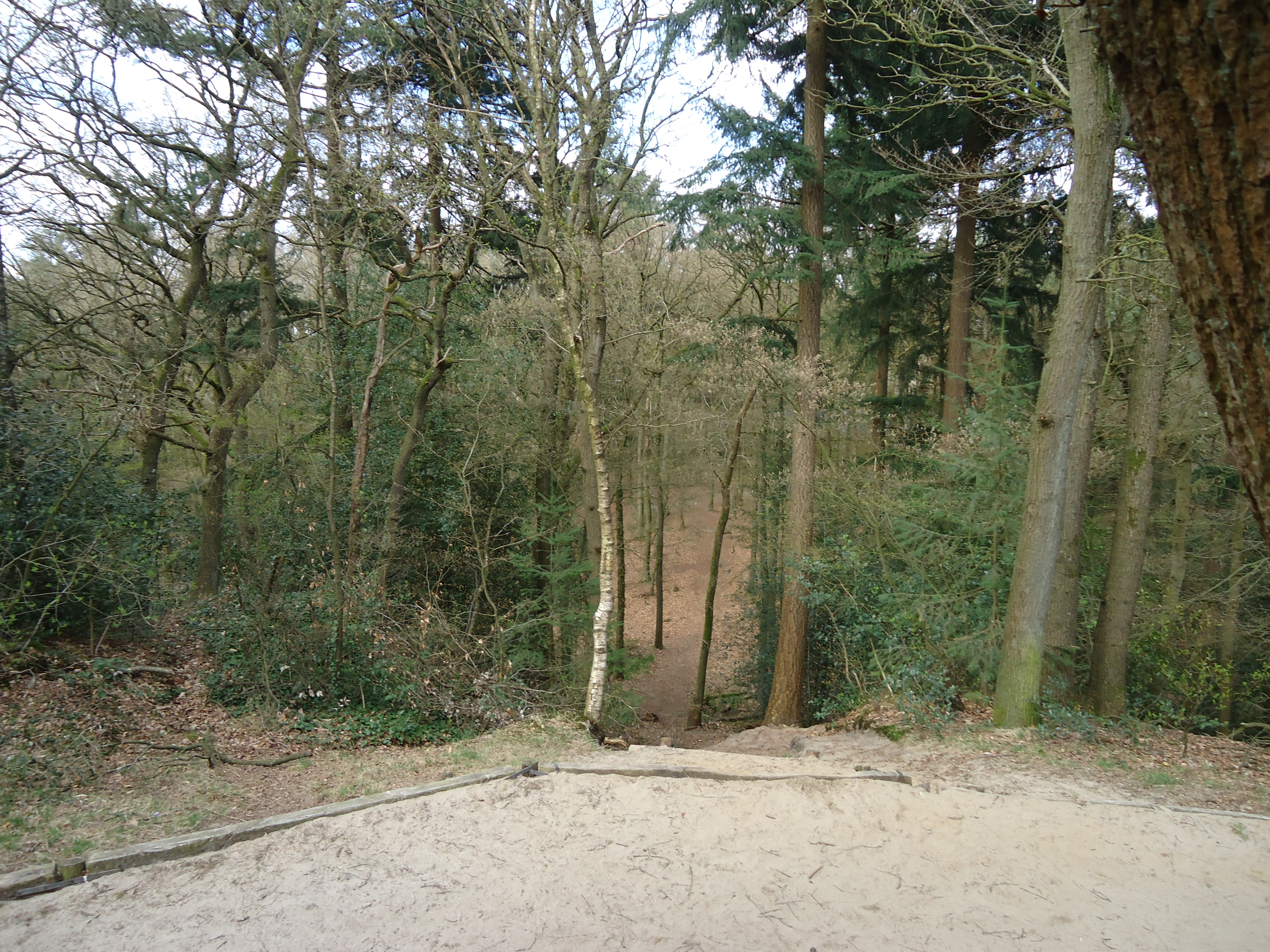 Sicht fan de Boskberch ôf nei it noardeasten ta.